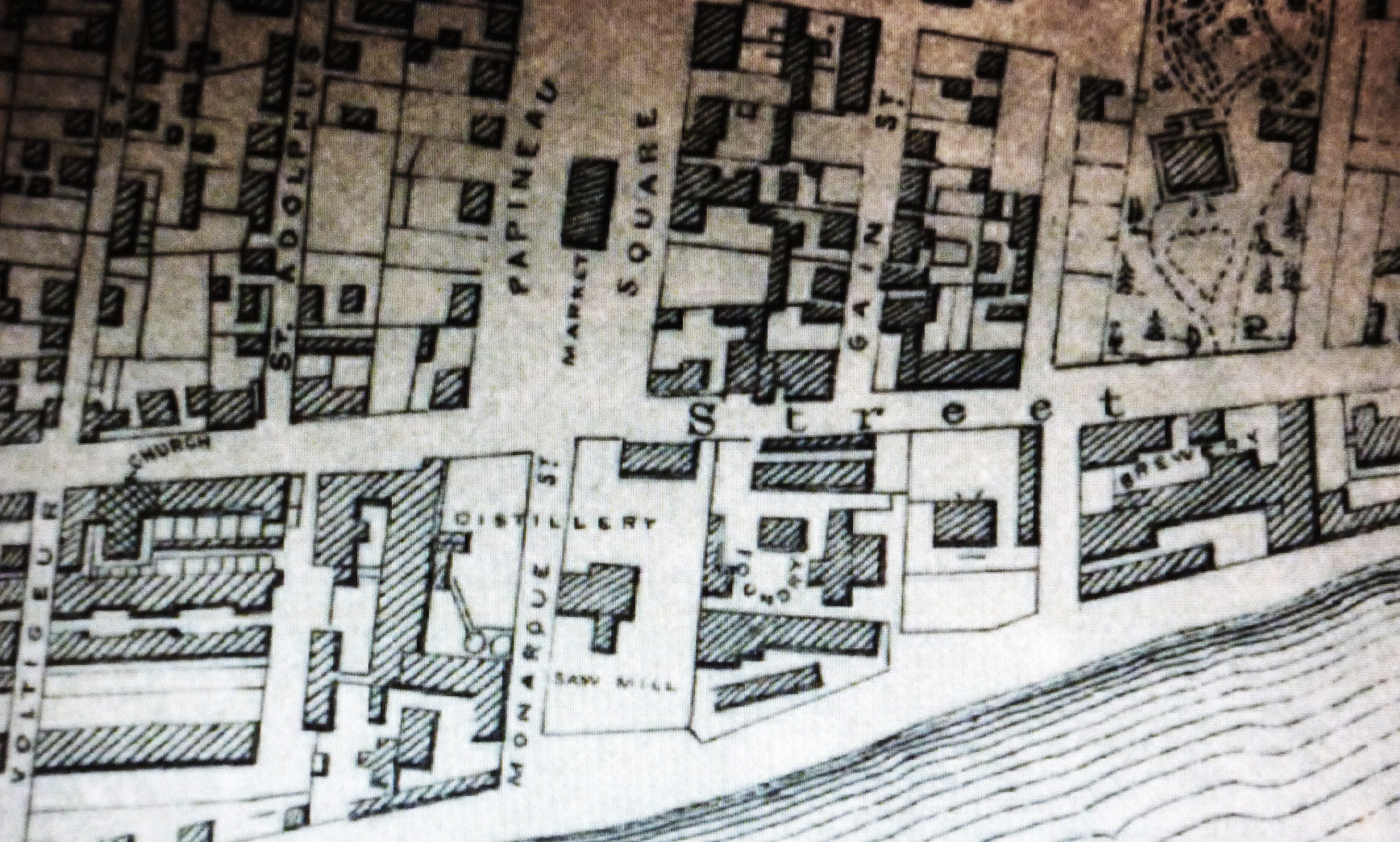 Document BANQ / Montreal Map: James Cane 1846. Le détail de cette carte nous montre les installations de l'Industriel John Molson dans le secteur Est de l'ancien faubourg Québec au milieu du XIXè siècle. La famille Molson jouit dans le faubourg d'une enviable renommée. À son arrivée dans le pays en 1782, John Molson achète d'un autre Irlandais, Thomas Loyd, la petite brasserie du Pied-du-Courant. Sous le régime français, les brasseries n'ont jamais été prospères, les colons préférant vins et spiritueux. Après la conquête, la venue des Loyalistes et des troupes britanniques relance l'industrie de la bière. Source texte: Pignon sur rue, Les quartiers de Montréal.